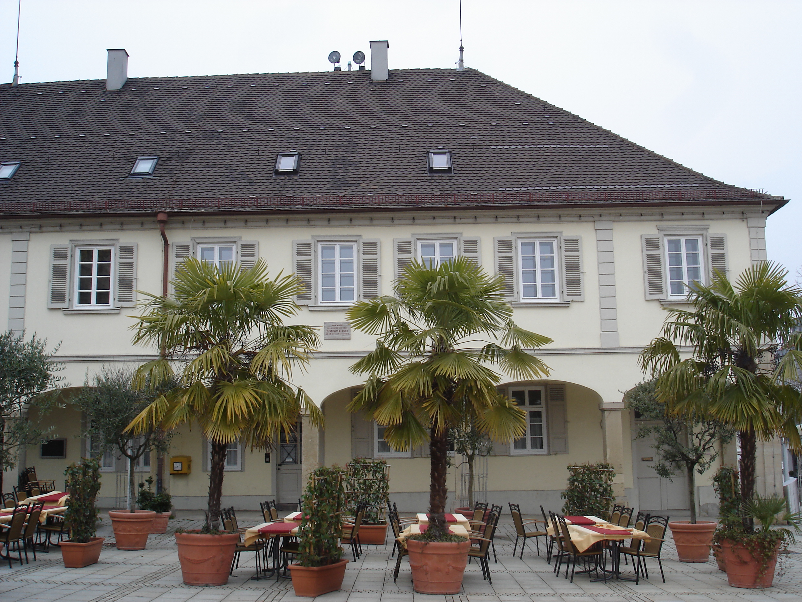 Justinus Kerners Geburtshaus in Ludwigsburg